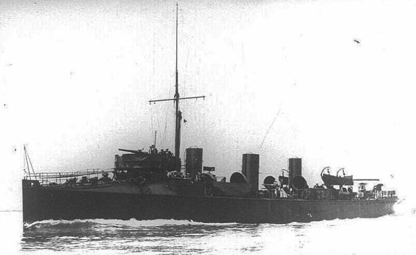 Der britische Torpedobootszerstörer CHEERFUL